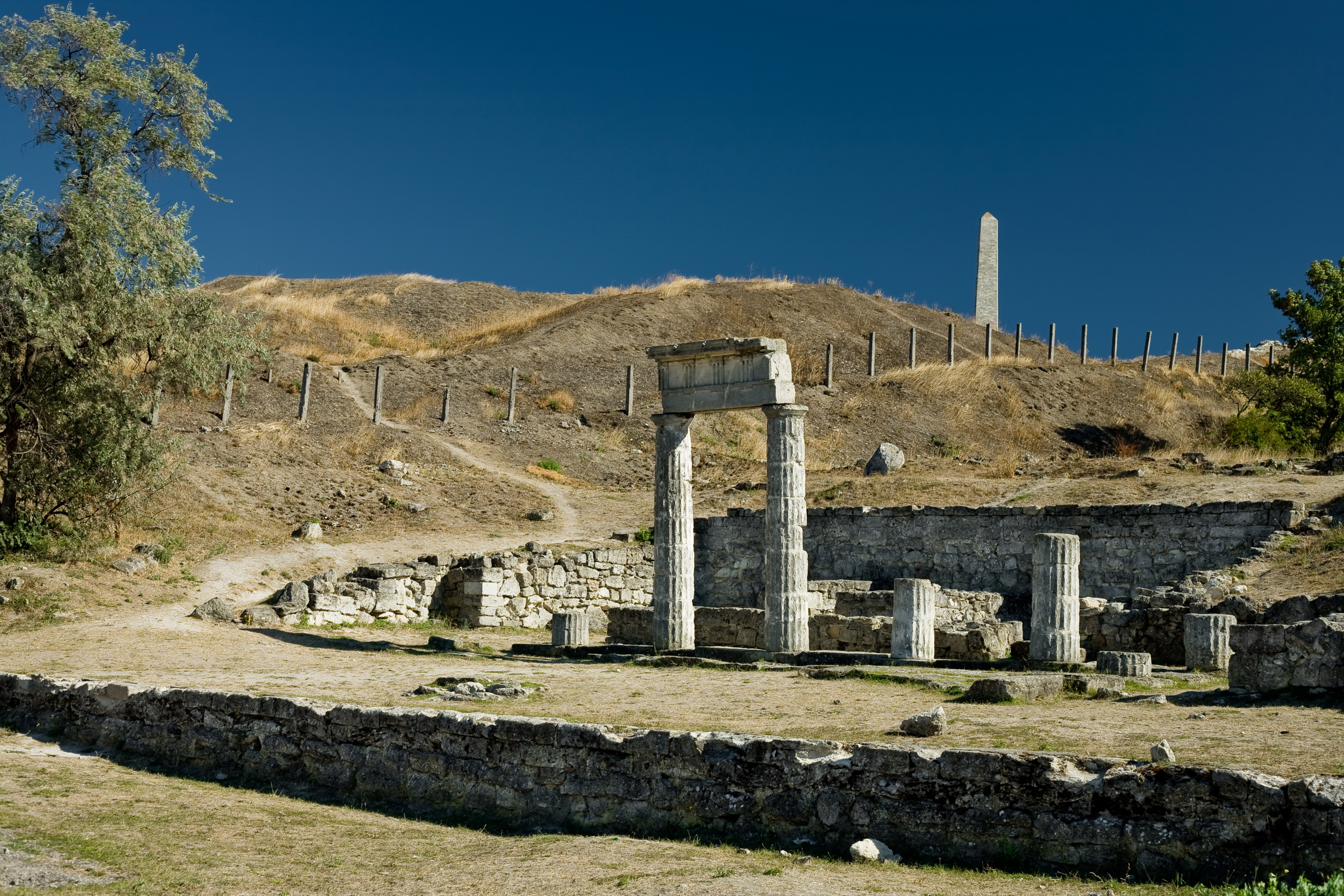 Керч, вул. Рибакова, гора Мітрідат, північний та північно-східний схили